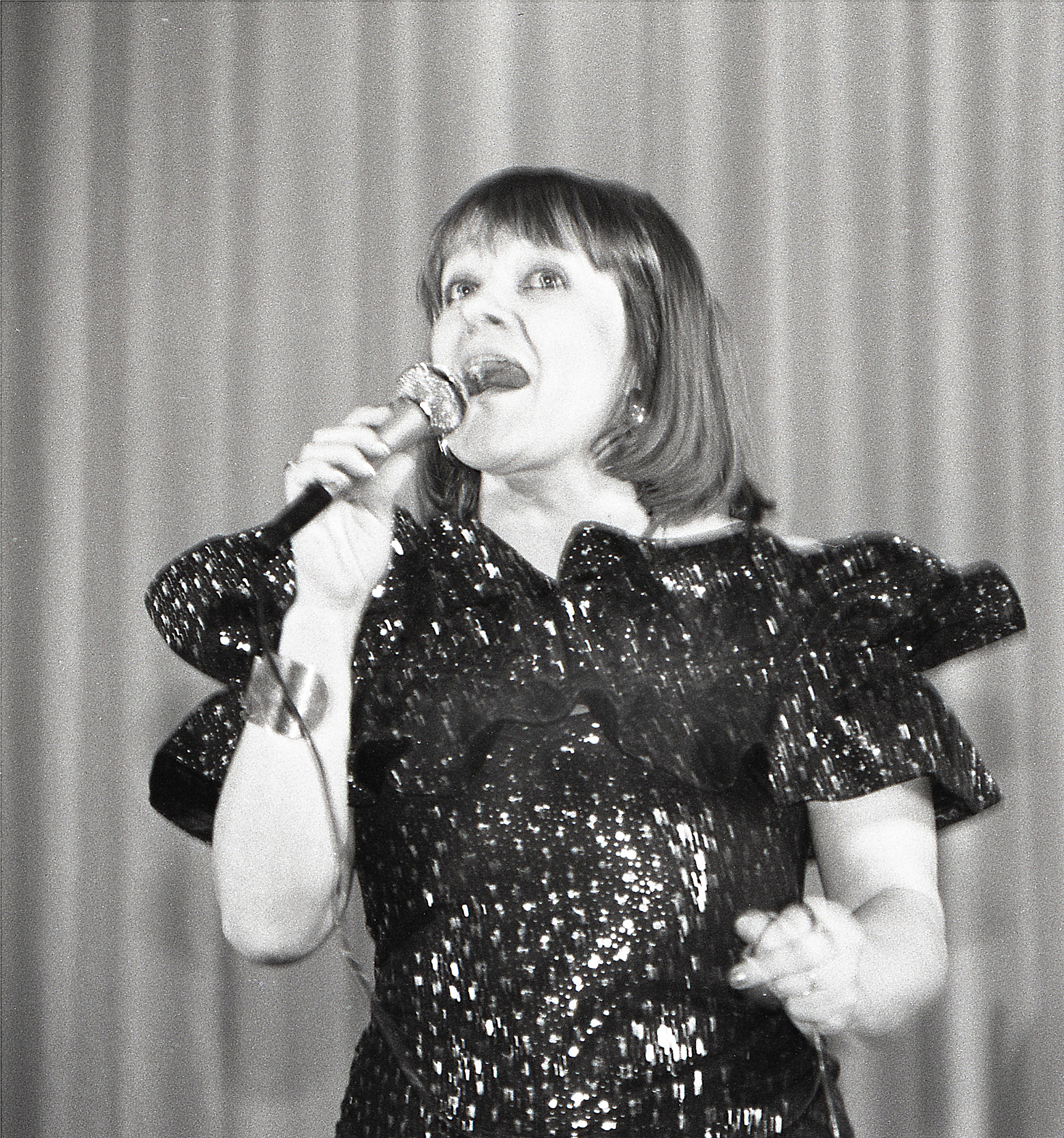 Silvi Vrait 1989. aastal